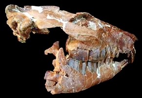 Fossil of Trachytherus, an extinct mammal - Museum of Natural History Lima